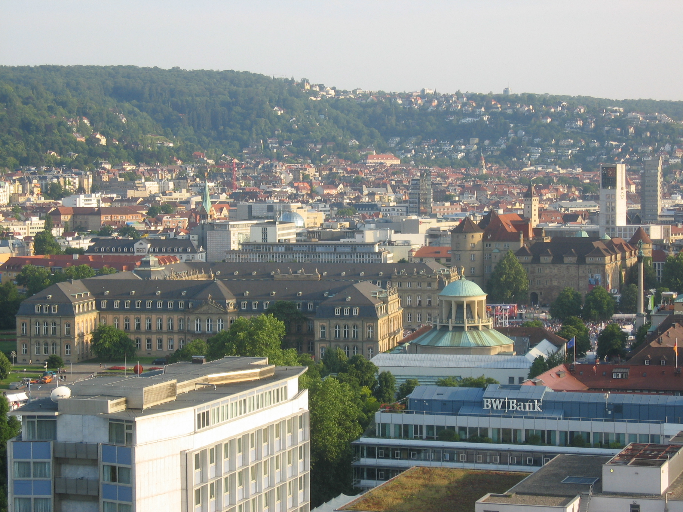 Blick vom Bahnhofs-Turm über Stuttgart auf das Alte und das Neue Schloss in Stuttgart.